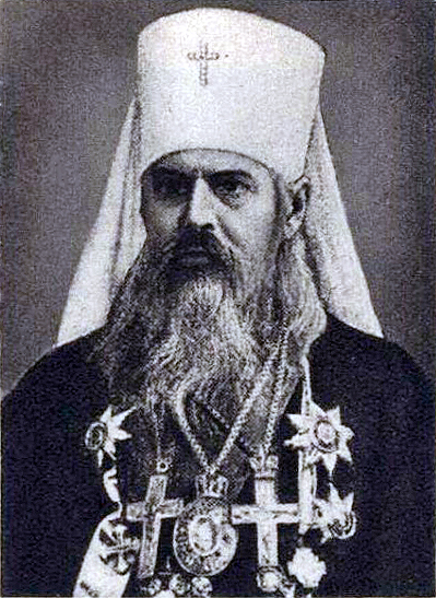 Митрополит Питирим (Окнов)